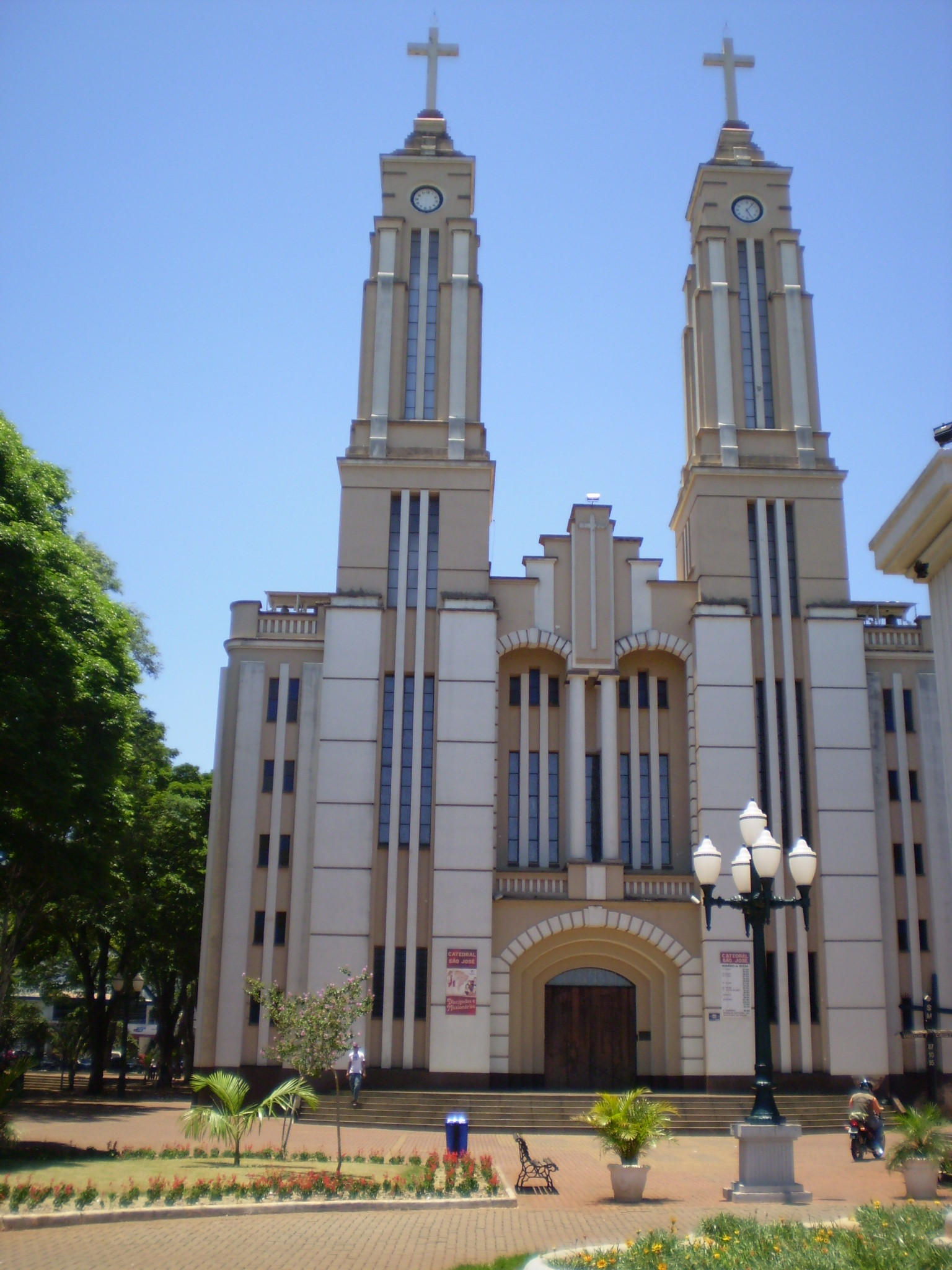 Catedral São José, Campo Mourão, Paraná.